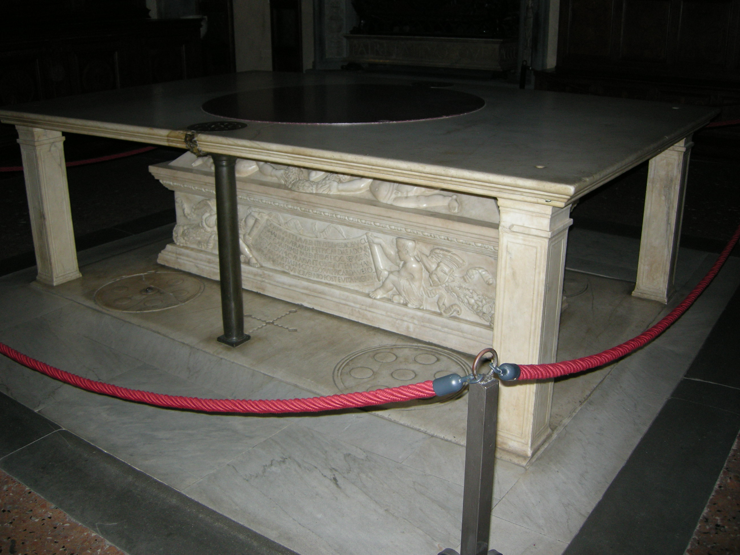 San lorenzo, sagrestia vecchia, tomba di giovanni di bicci e piccarda bueri del buggiano